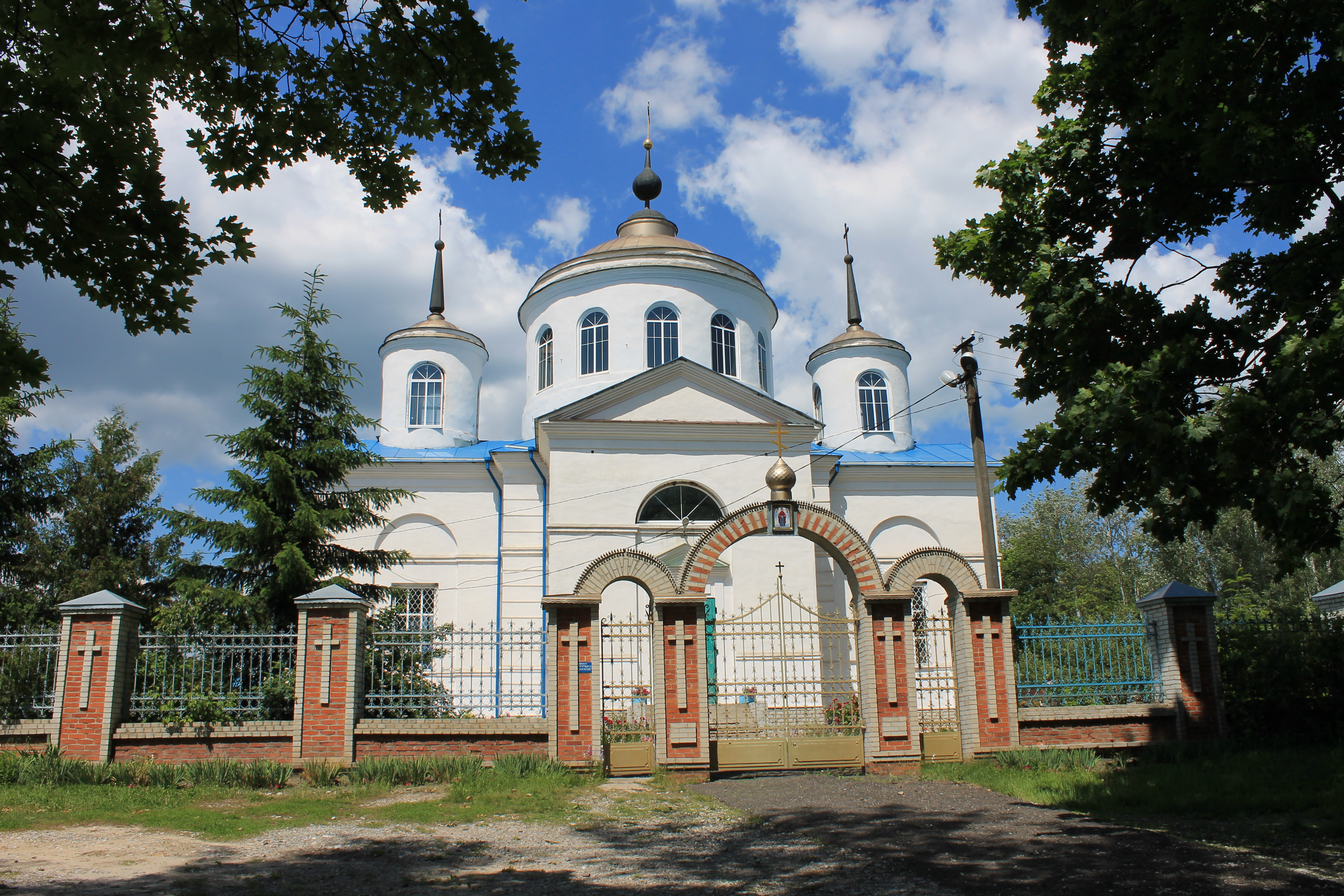 Покровська церква 1809 р. Архітектор П. А. Ярославський. с. Пархомівка. Краснокутський р-н. Харківська обл.